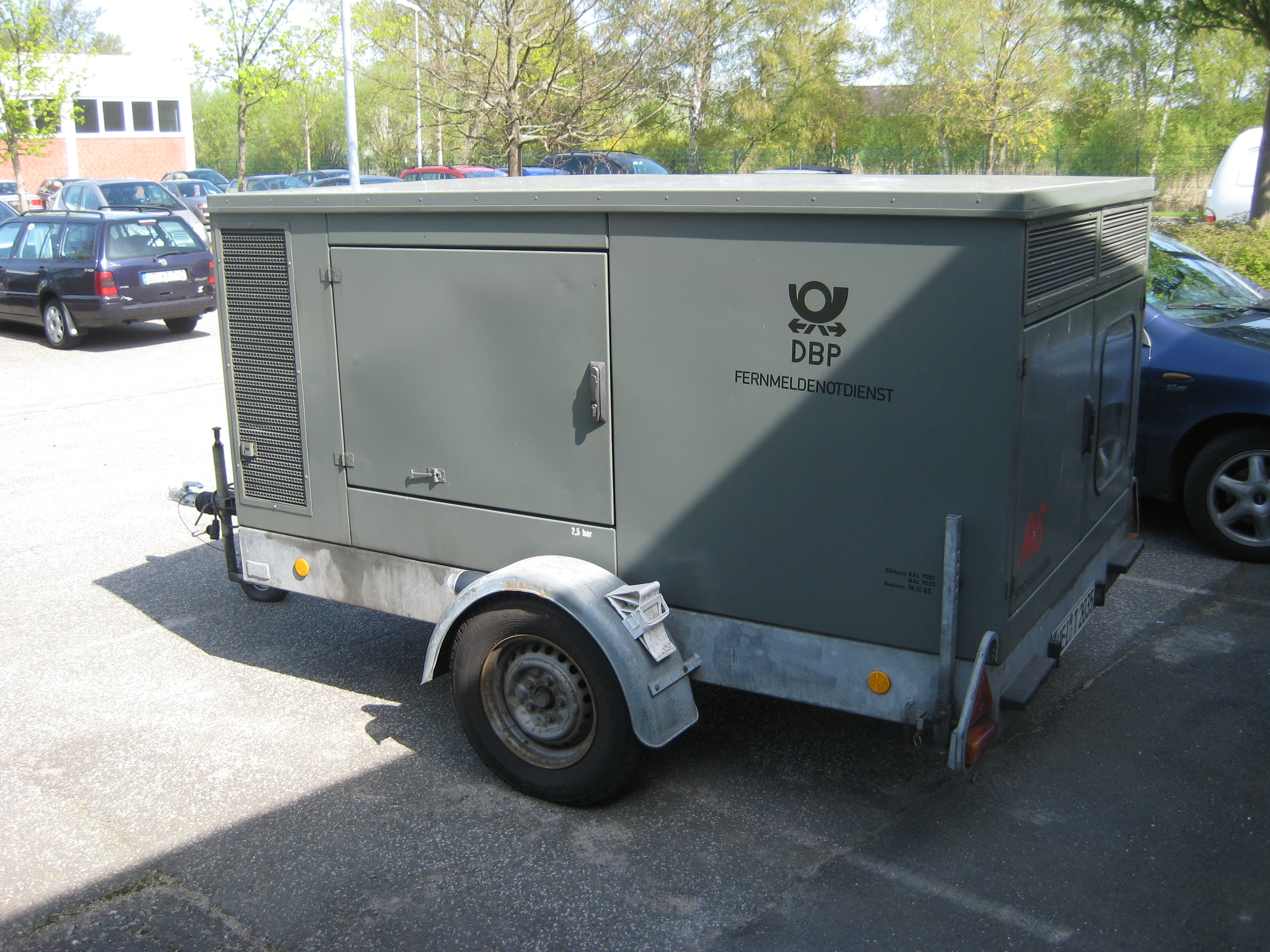 Notstromgenerator